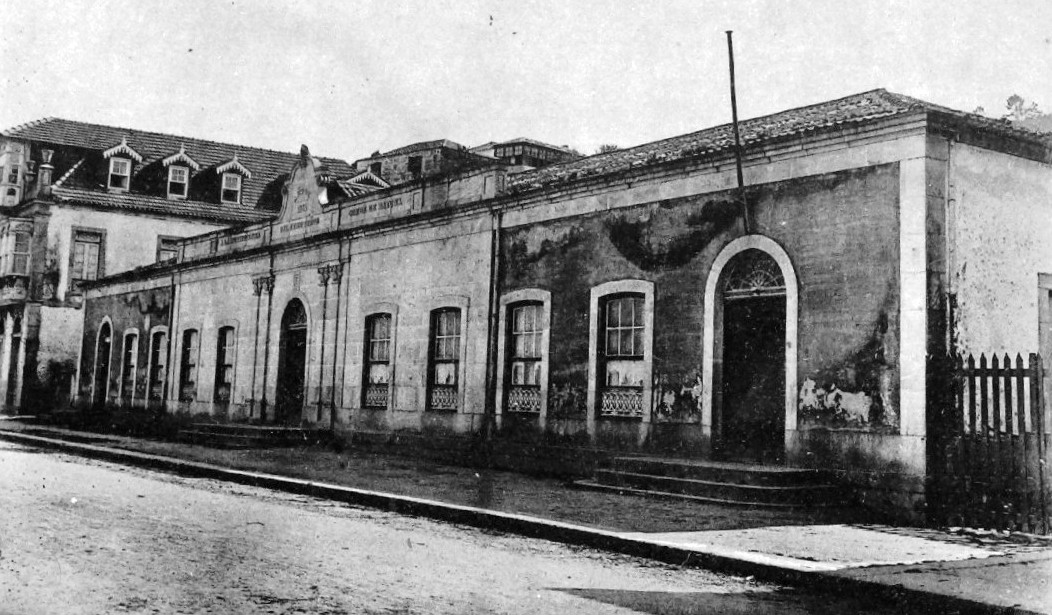 Edificio escuelas, regalado por el Sr. Marqués de Misa